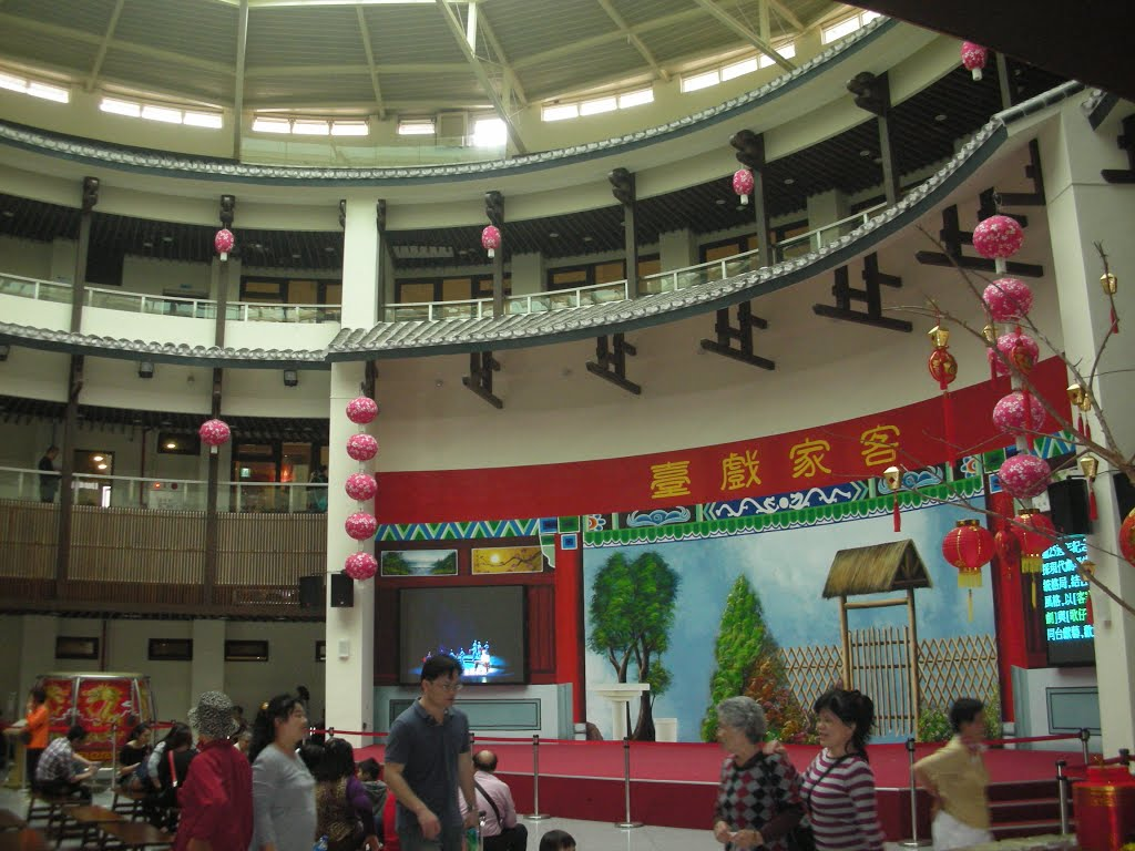 苗栗客家圓樓(內部)